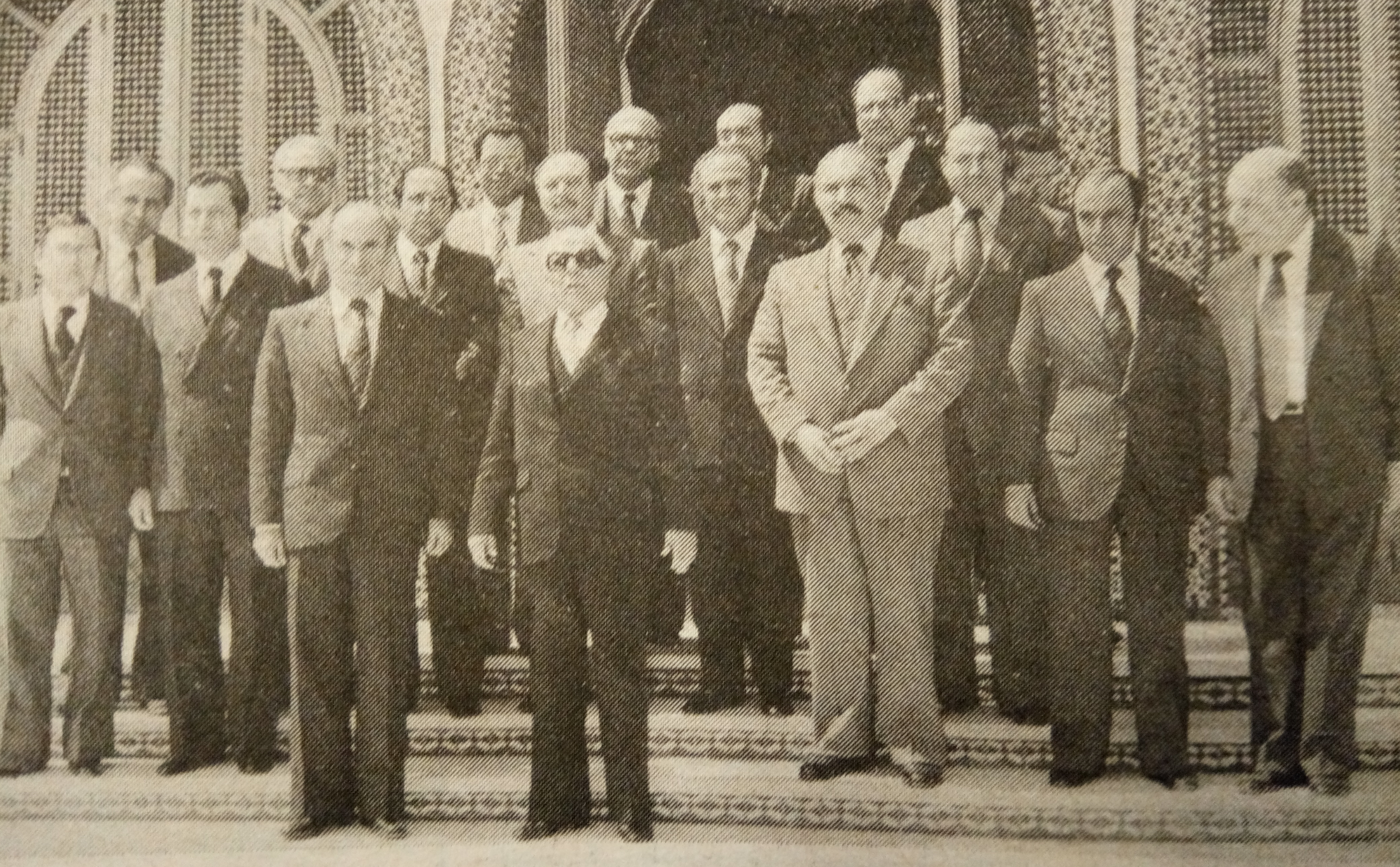 Assabah 1980